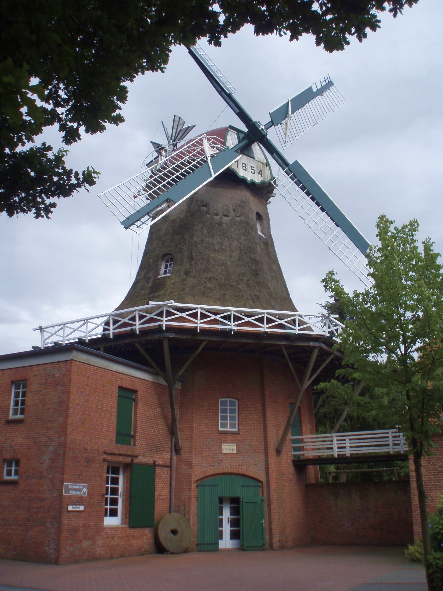 Mühle in Münkeboe. Es handelt sich um einen zweigeschossigen Galerieholländer Die Mühle gehört zum Dorfmuseum Münkeboe. Das Foto wurde aufgenommen in Münkeboe